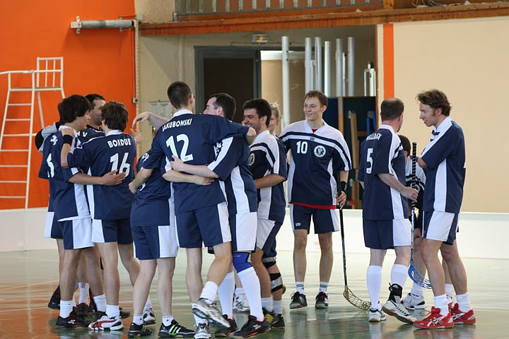 Floorball : finale du championnat de France D2 avec les Nordiques Floorball Club.